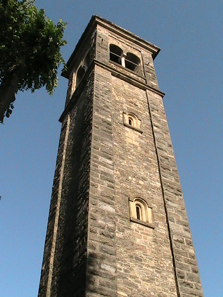 Serravalle (Varano de' Melegari) - Pieve di San Lorenzo -campanile